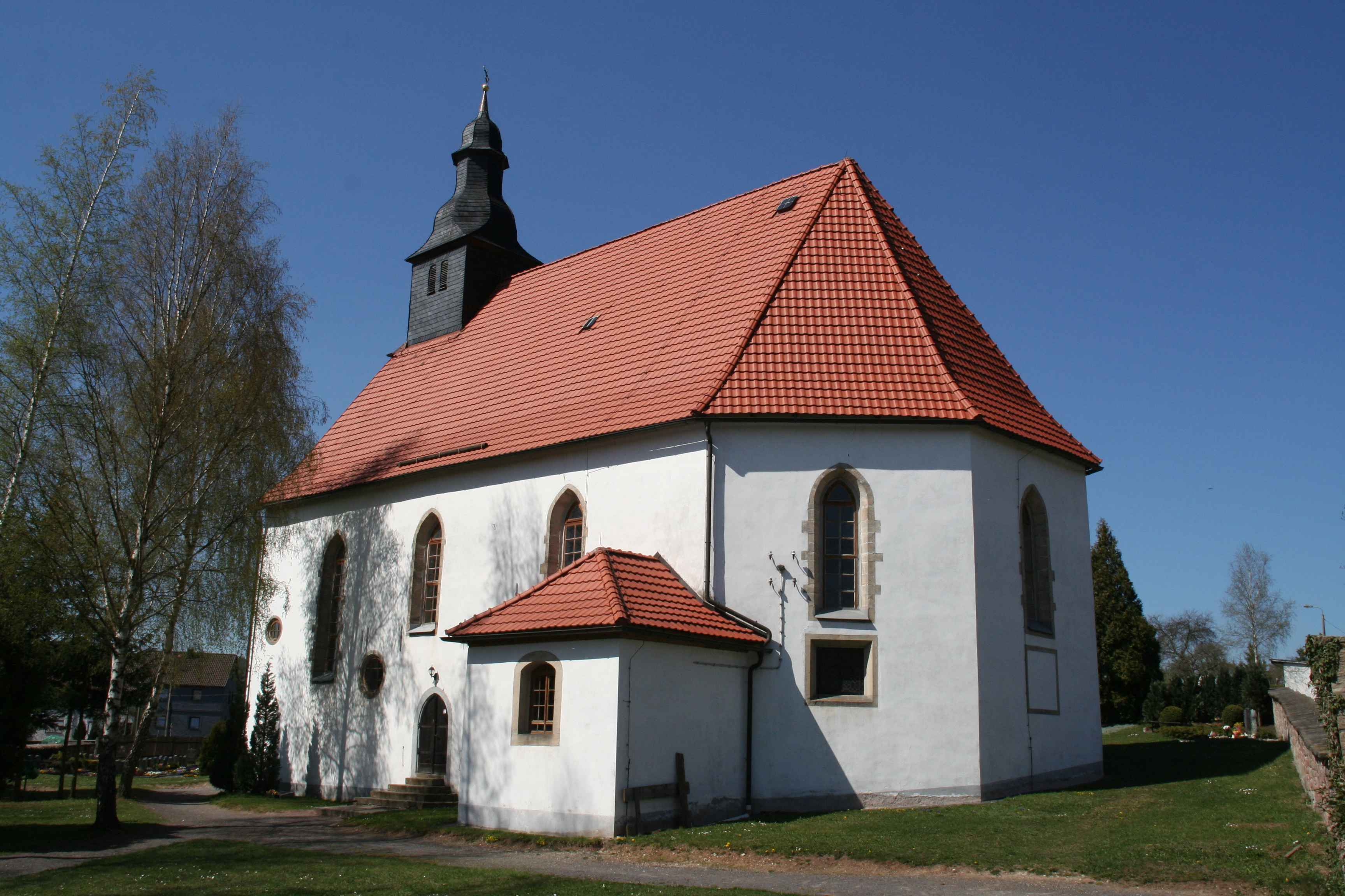 ev. Kirche Brünn evangelische Kirche in Brünn, Landkreis Hildburghausen